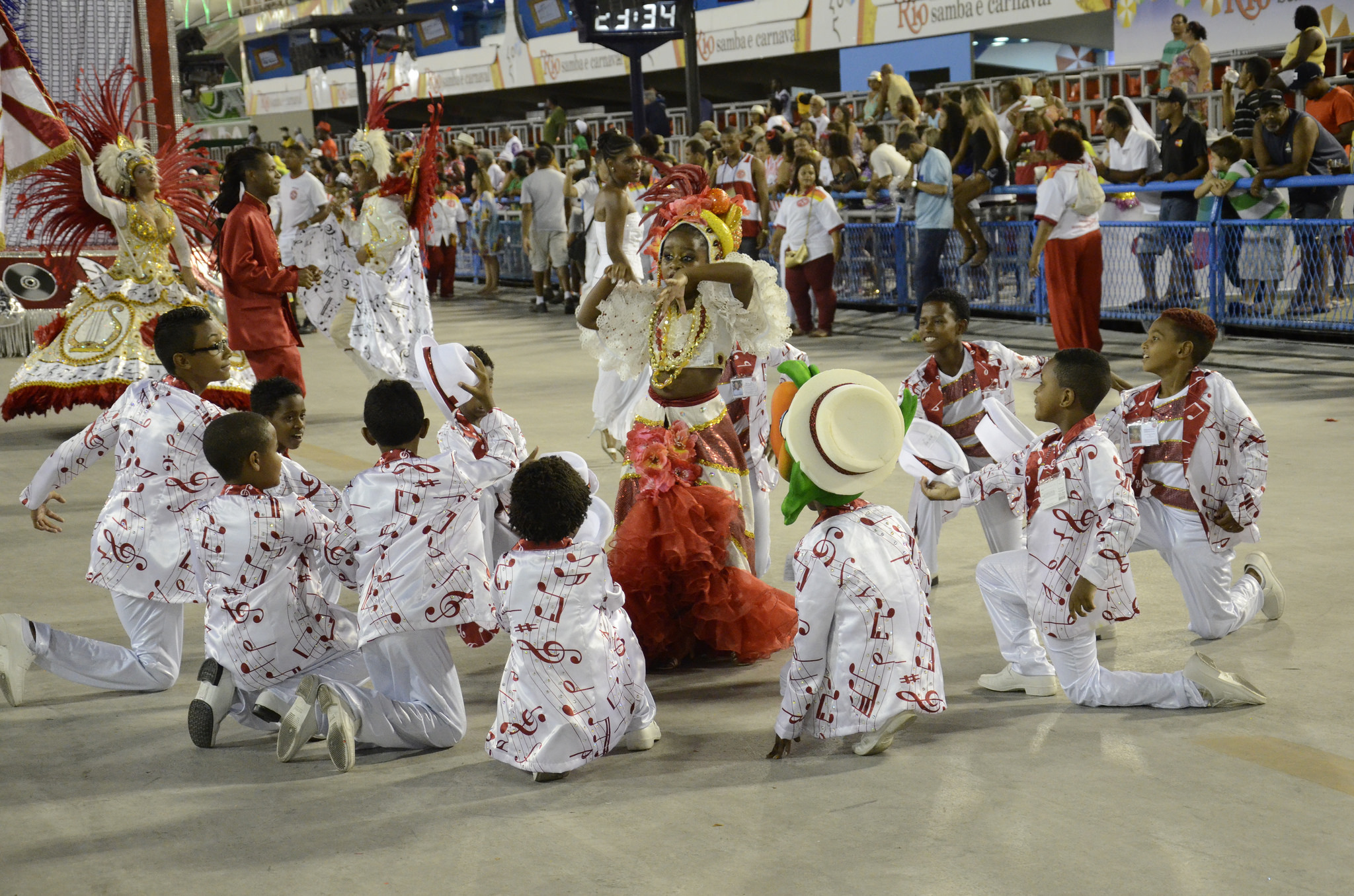 Rio de Janeiro - Pequenos sambistas fecham desfiles na Marquês de Sapucaí.